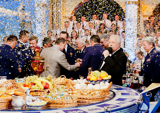 Телевизионная игра «Поле чудес», посвященная 100-летнему юбилею военной авиации России